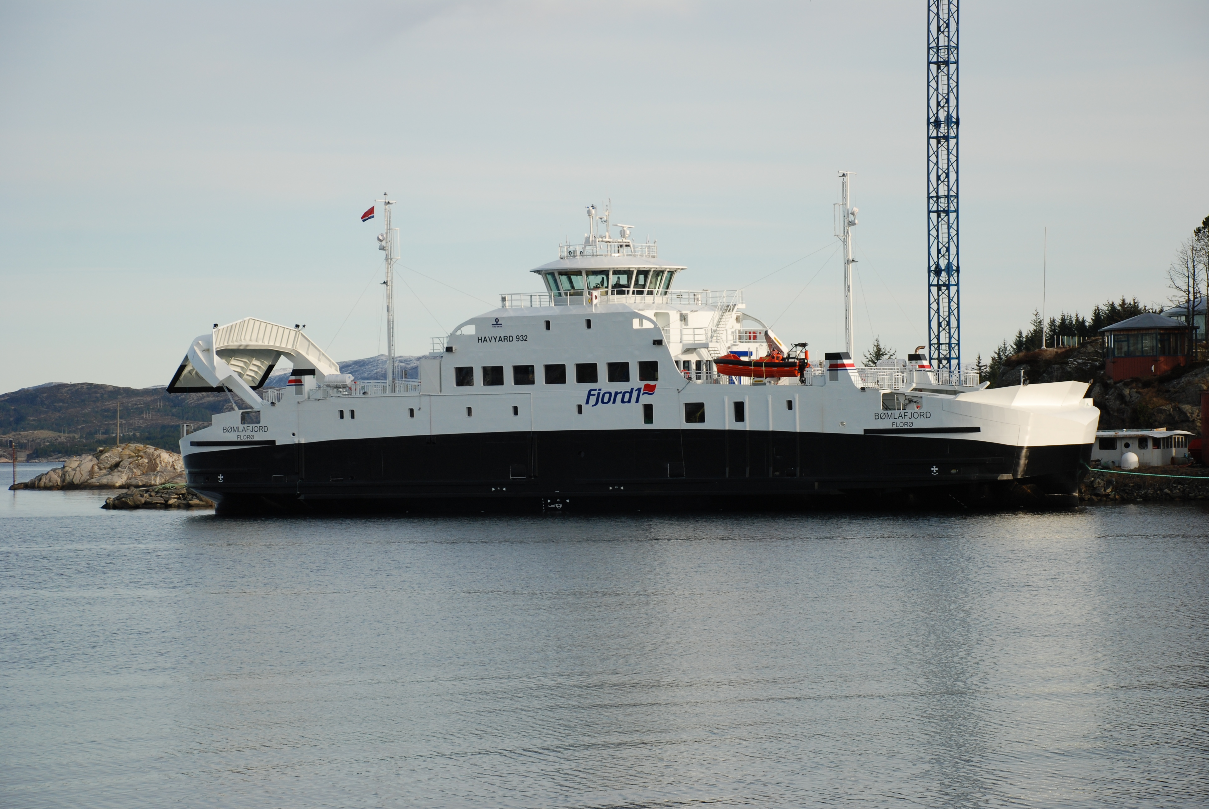 Bømlafjord ved Fonnes, Austrheim. Klargjering og test.